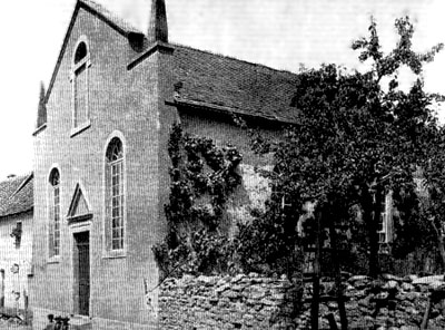 Ehemalige Synagoge in Insming